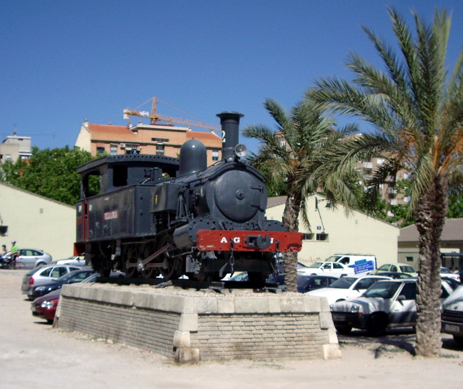 Maquina "Villalonga" (Alcoi-Gandia)